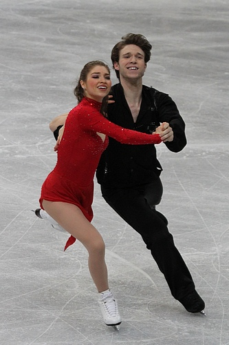 Лаури Бонацорси и Тревис Маджер (США) на чемпионате мира по фигурному катанию среди юниоров 2012